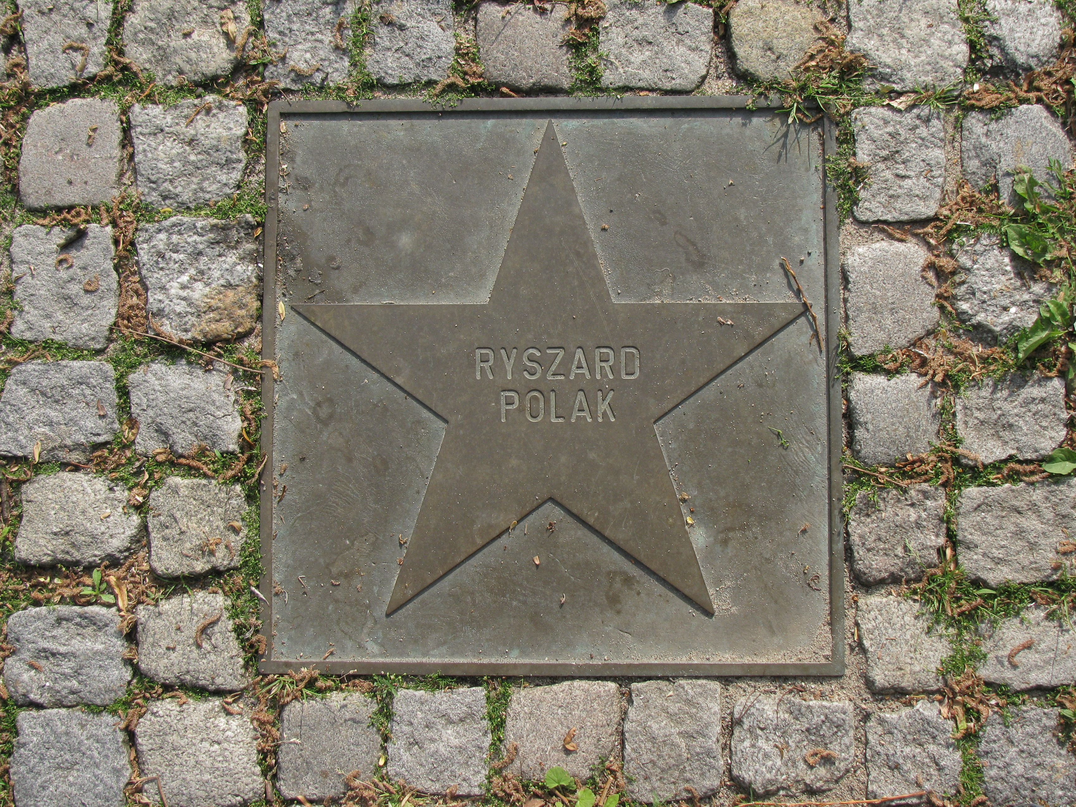 Gwiazda piłkarza Ryszarda Polaka (1959–2017) w Alei Gwiazd Lechii Gdańsk, korona stadionu przy ul. Traugutta.